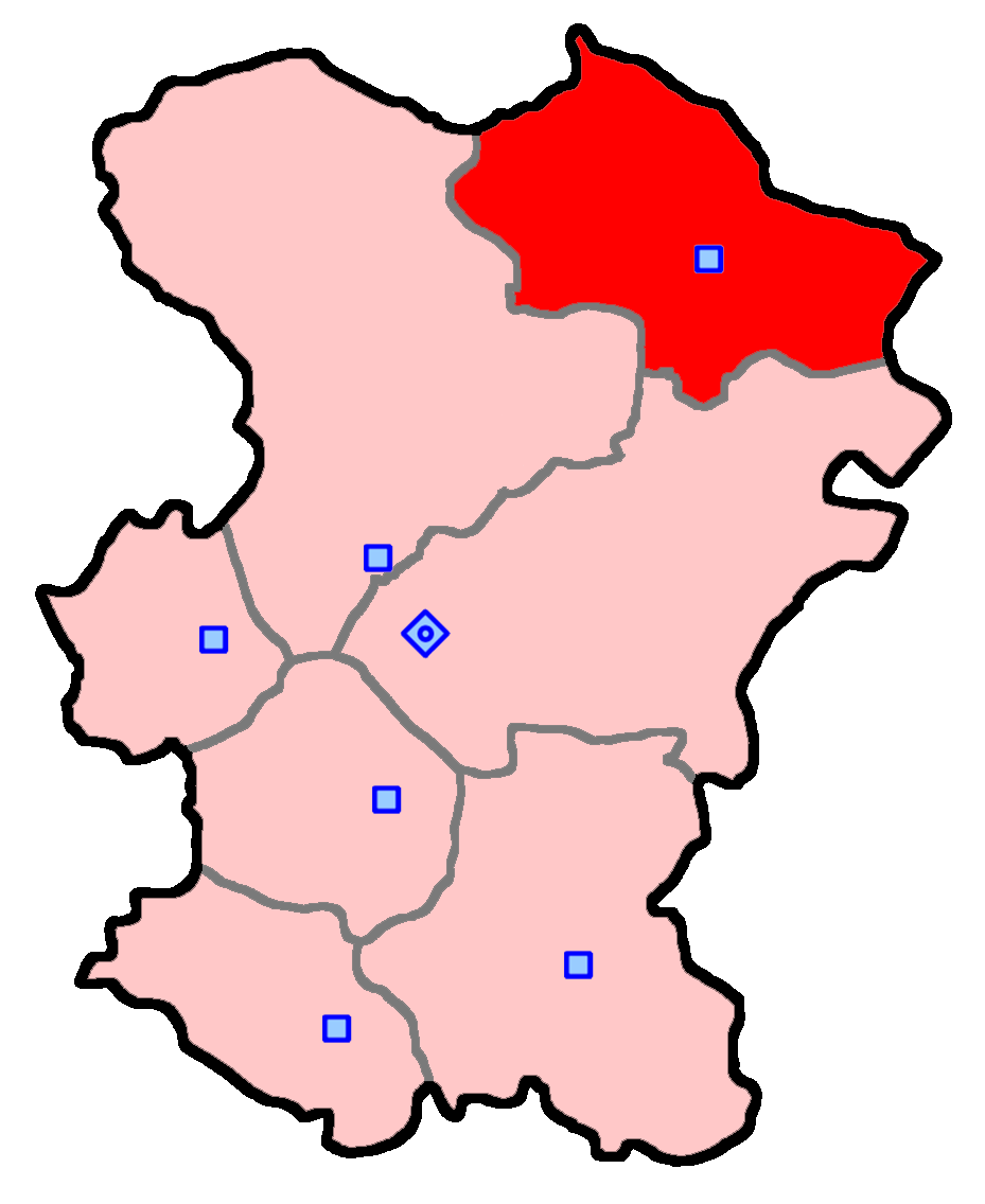 حوزهٔ انتخاباتی رزن برای انتخابات مجلس شورای اسلامی